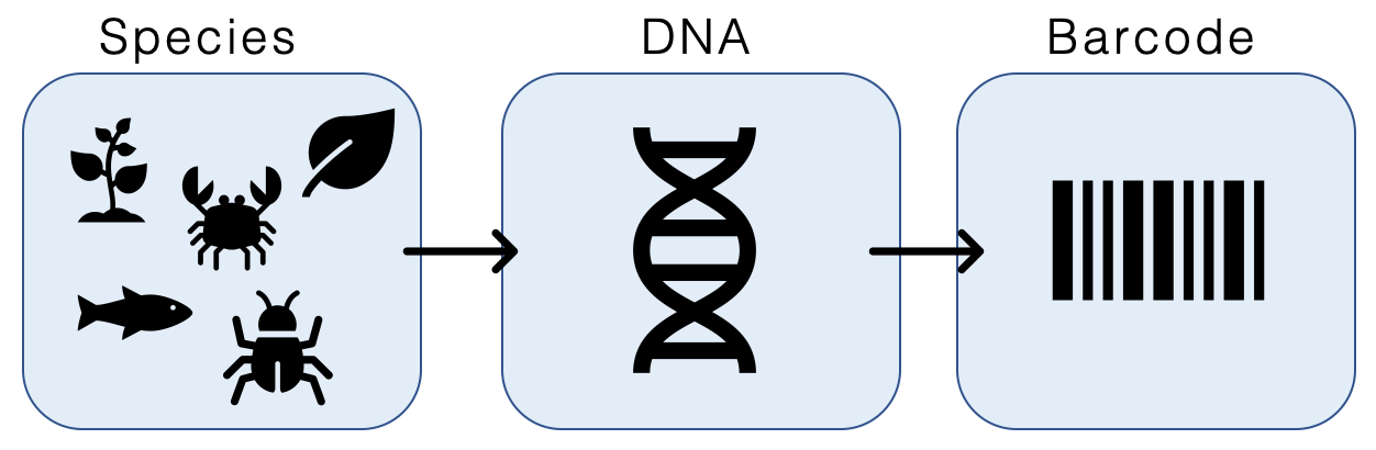 Schematische Darstellung DNA barcoding